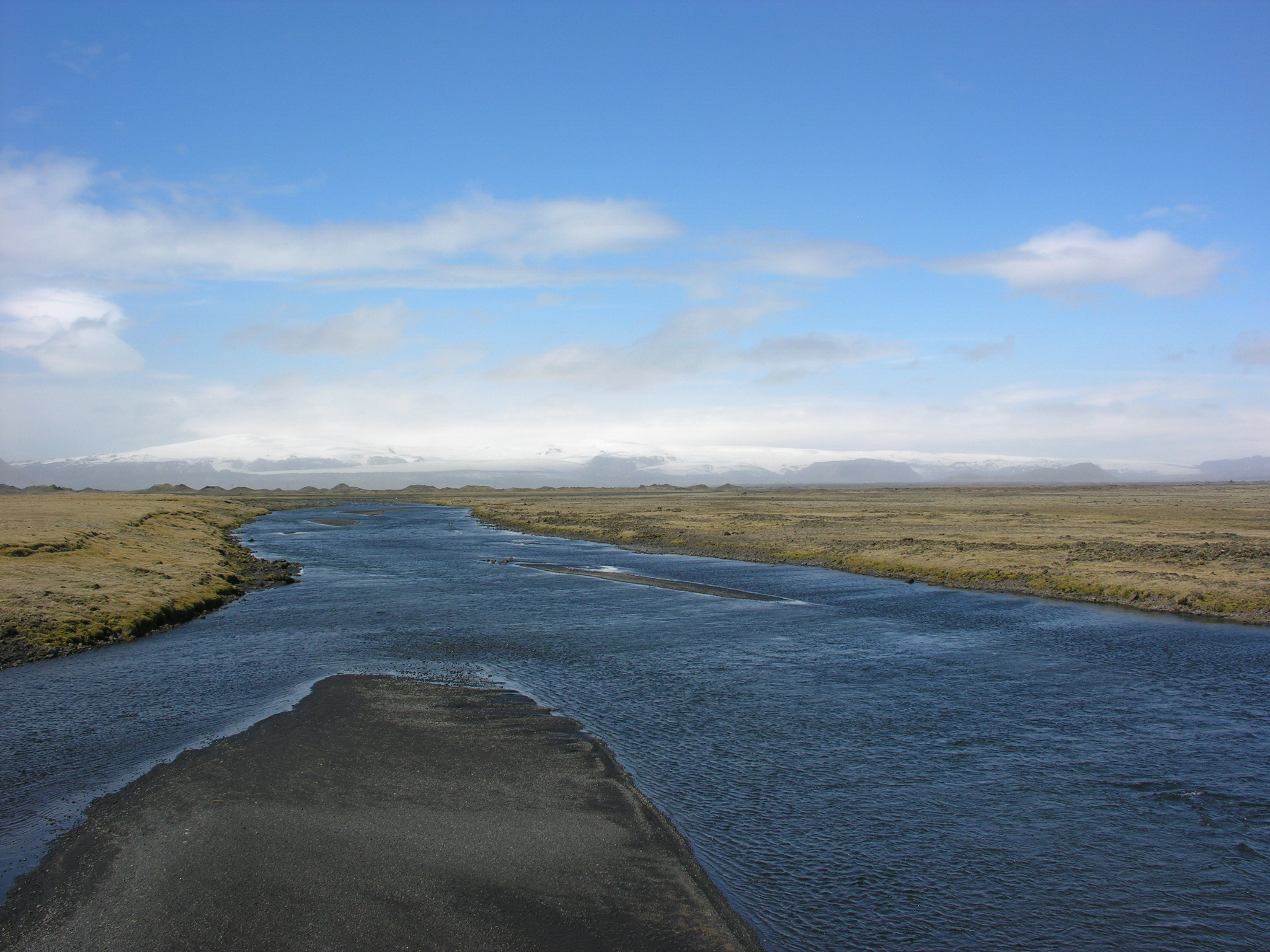 Iceland, Mýrdalssandur